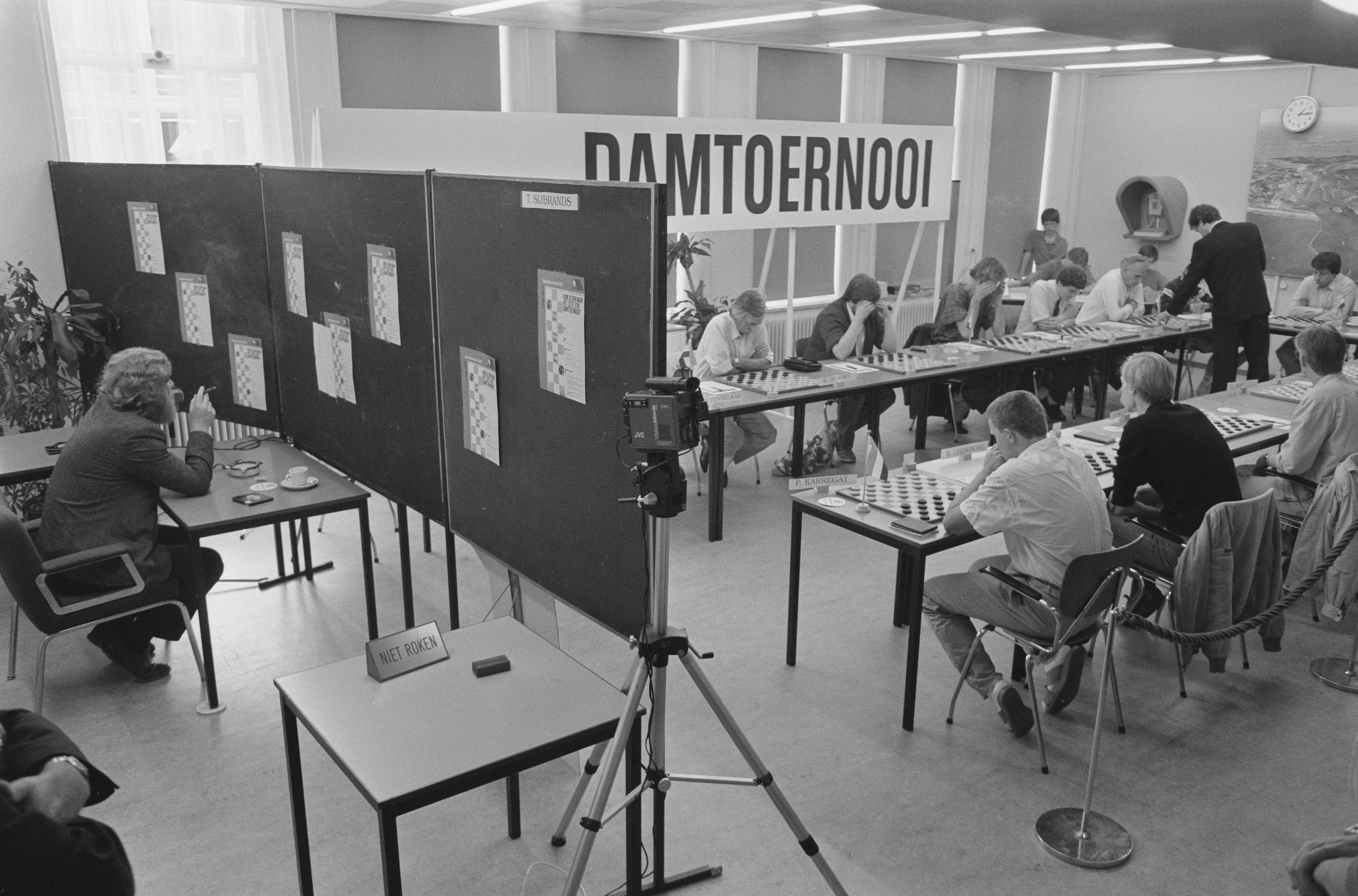 Ton Sijbrands verbetert record "blind-dammen" in Velsen